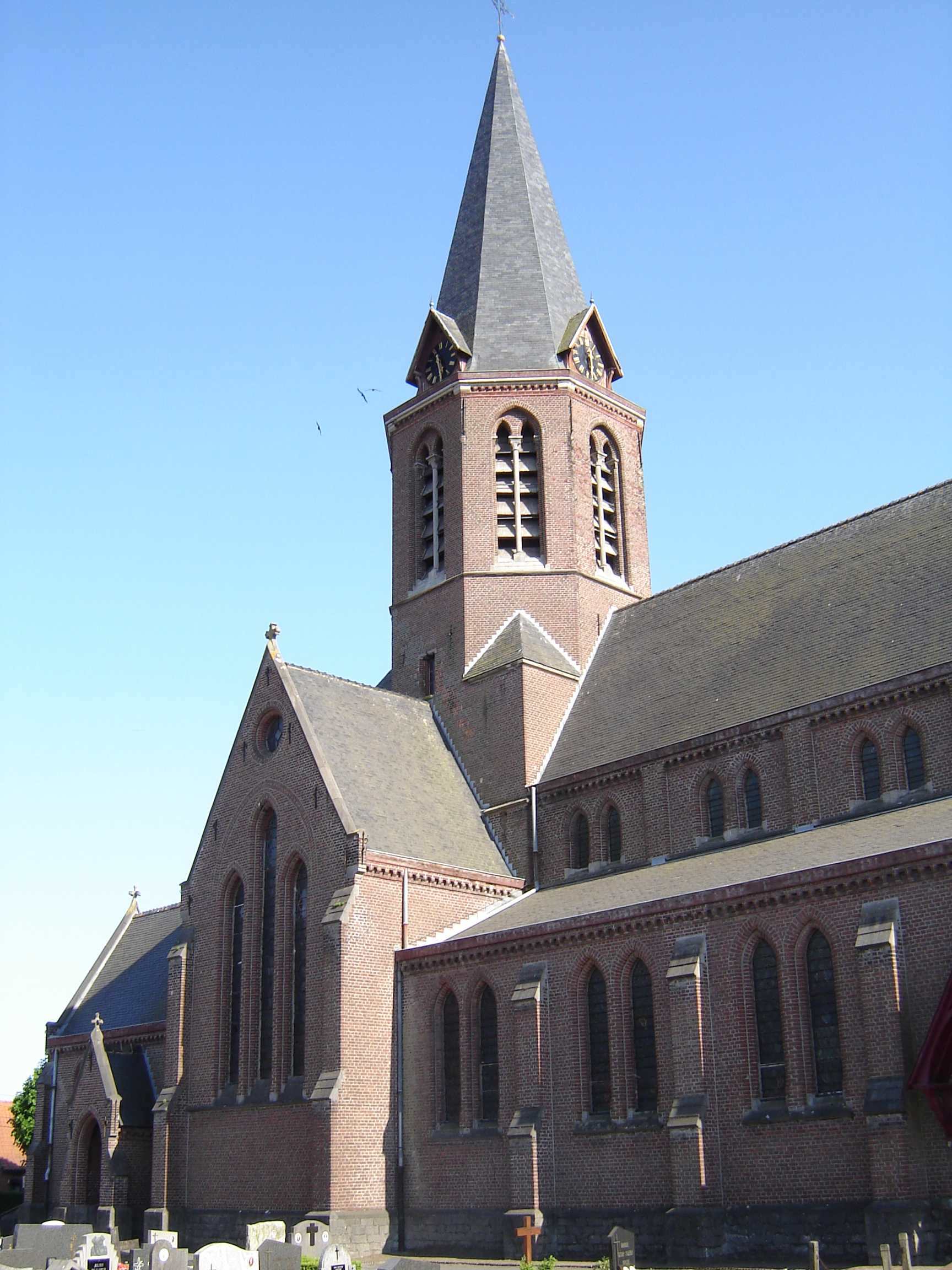 Kerk van Onze-Lieve-Vrouw en Sint-Jan Baptist in Maria-Leerne Church of Our Lady and Saint John Baptist in Maria-Leerne, Bachte-Maria-Leerne, Deinze, East Flanders, Belgium